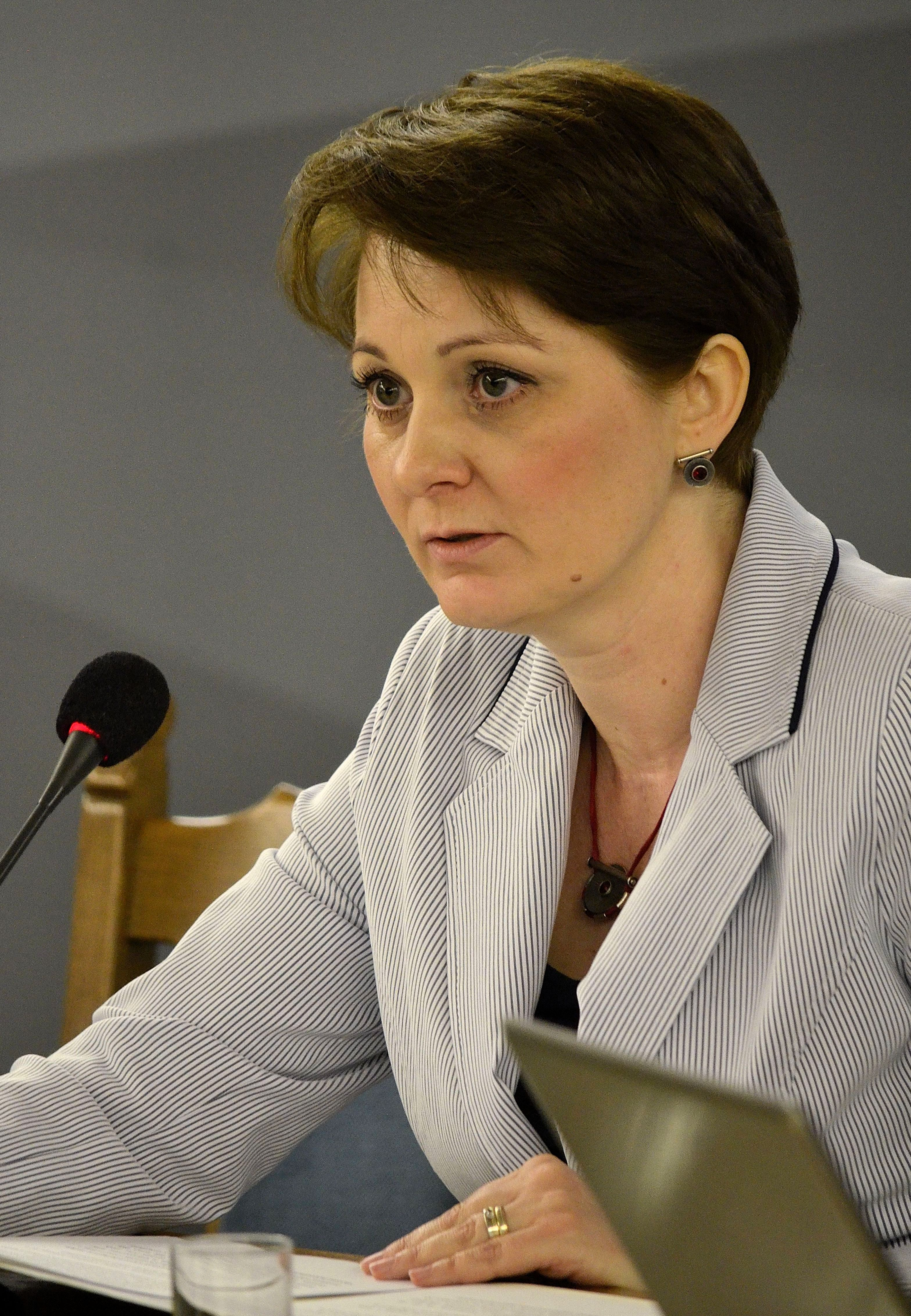 Generalny Inspektor Danych Osobowych Edyta Bielak-Jomaa podczas konferencji „Internet jako globalne dobro wspólne?” w Sejmie